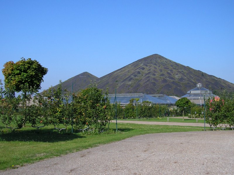 Terrils n° 74, 74A et 74B respectivement dénommés 11 - 19 de Lens Est, 11 - 19 de Lens Ouest et 11 - 19 de Lens Nouveau, fosse n° 11 - 19 de la Compagnie des mines de Lens, Loos-en-Gohelle, Pas-de-Calais, Nord-Pas-de-Calais, France.